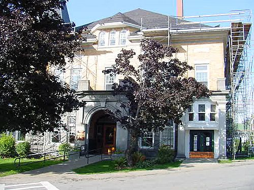 Derby Line, Vermont.